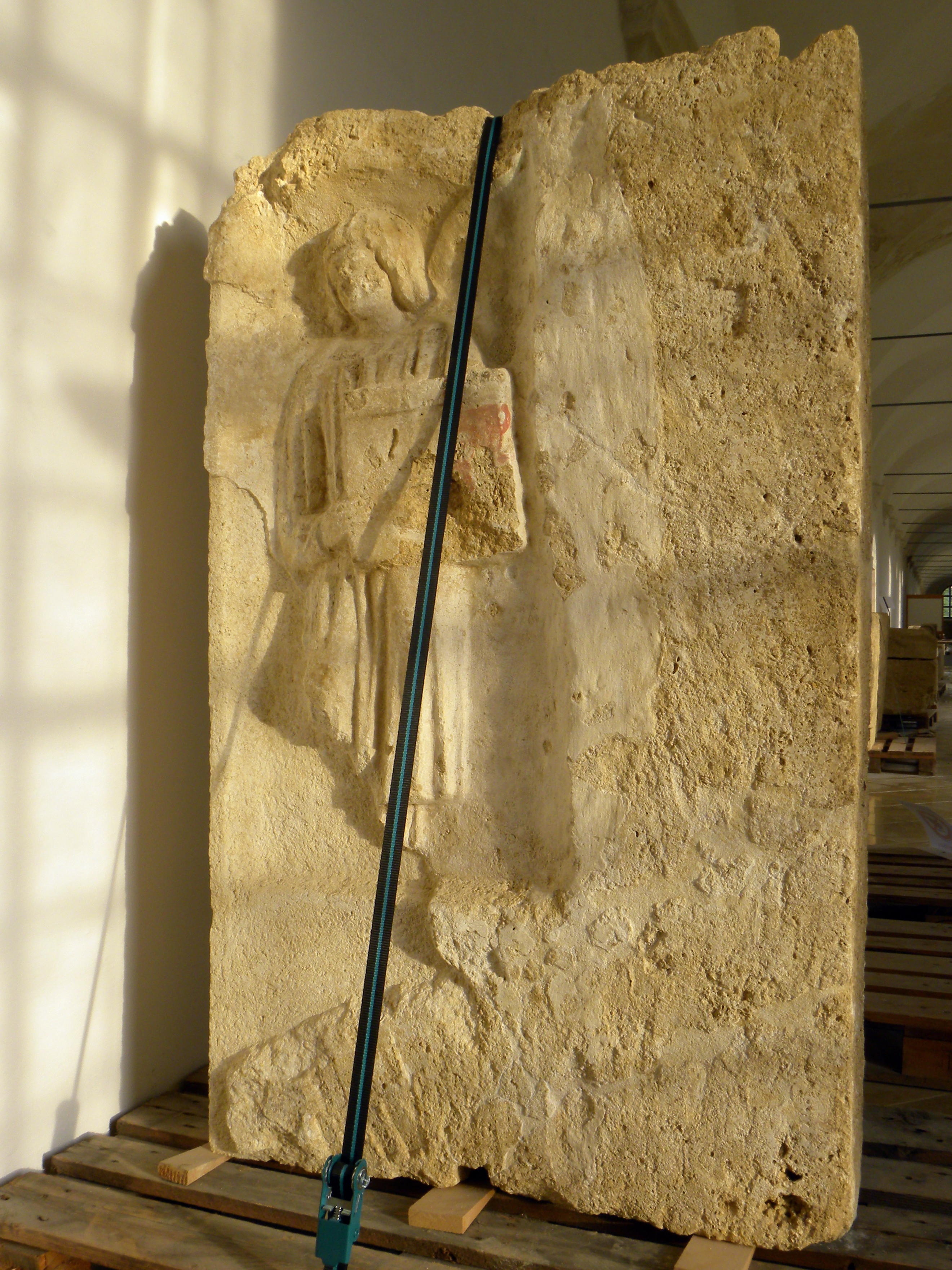 Dieses Bild wurde anlässlich des österreichischen Tags des Denkmals 2012 in Niederösterreich eingereicht.